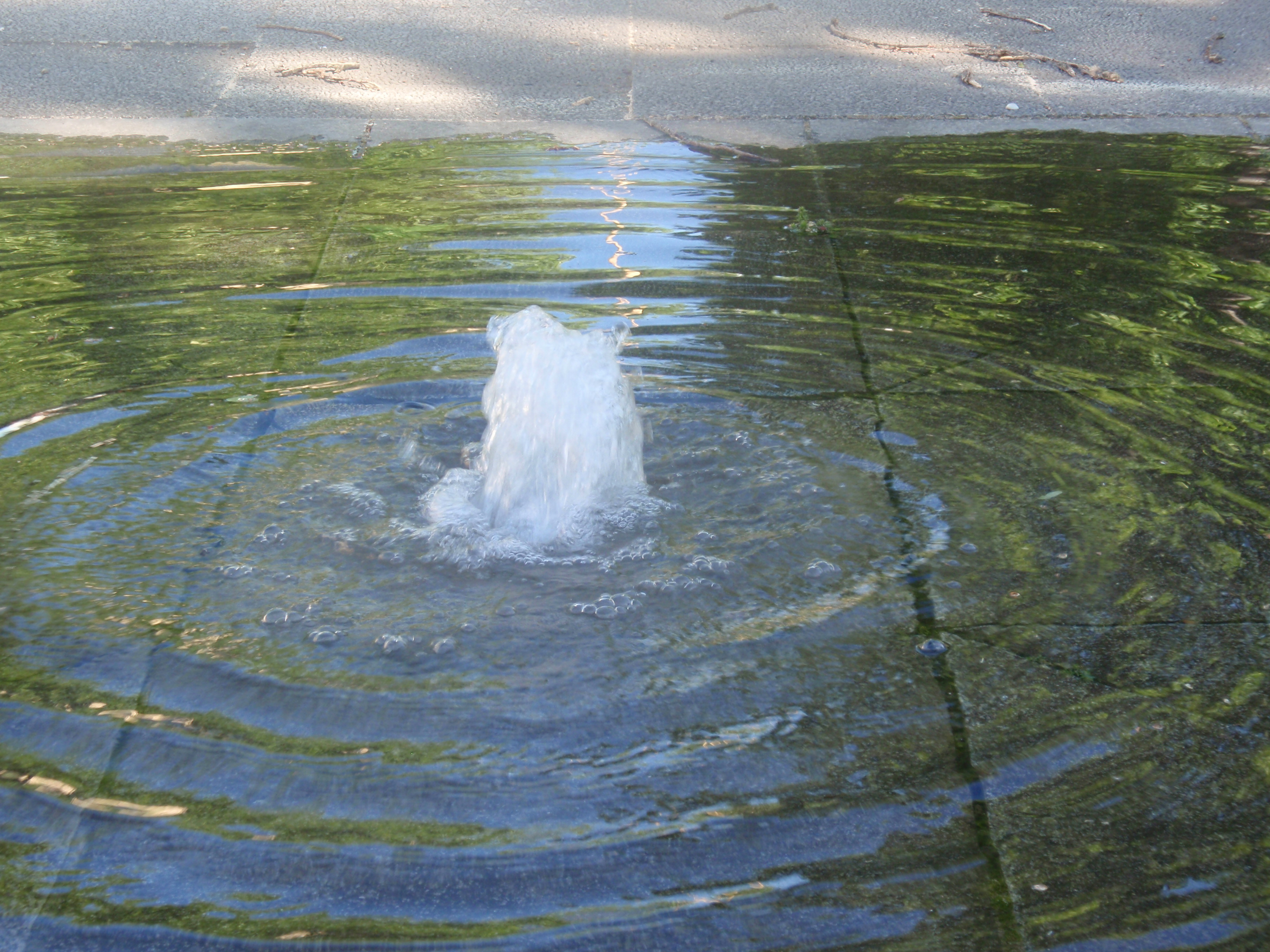 Náměstí Svobody, vodní prvek, vodotrysk